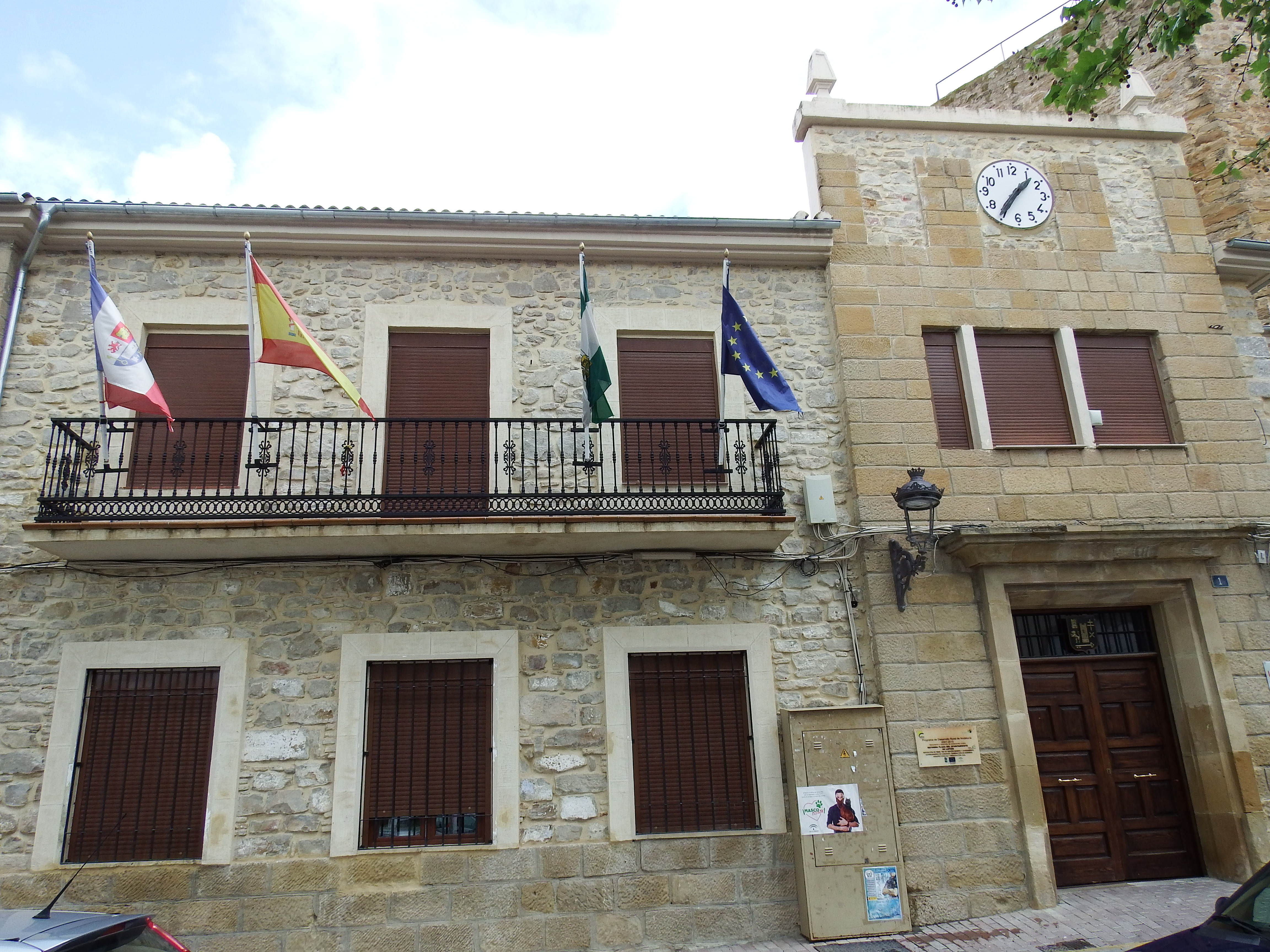 Lupión